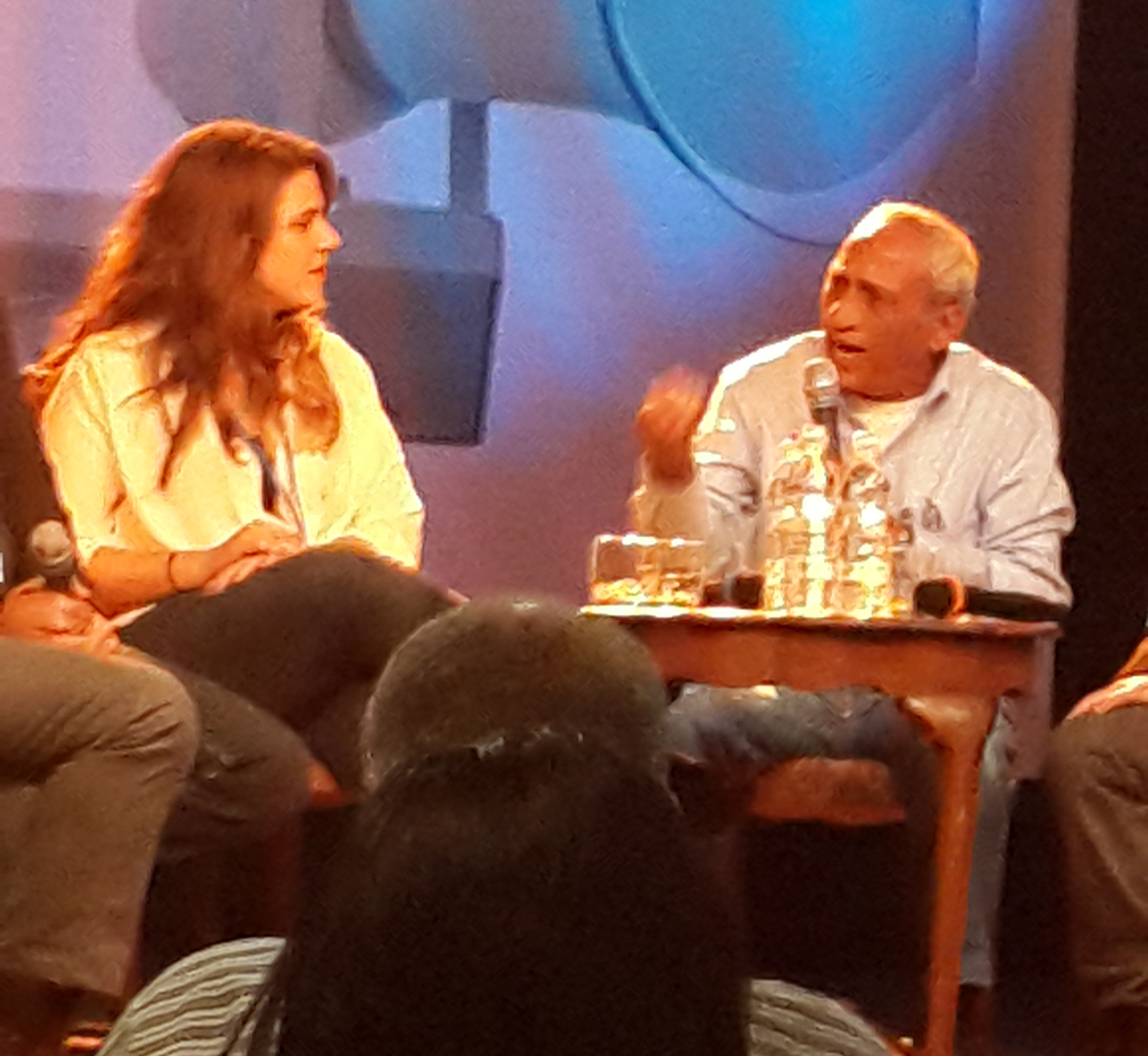 צא'רלי ביטון לצד דפני ליף